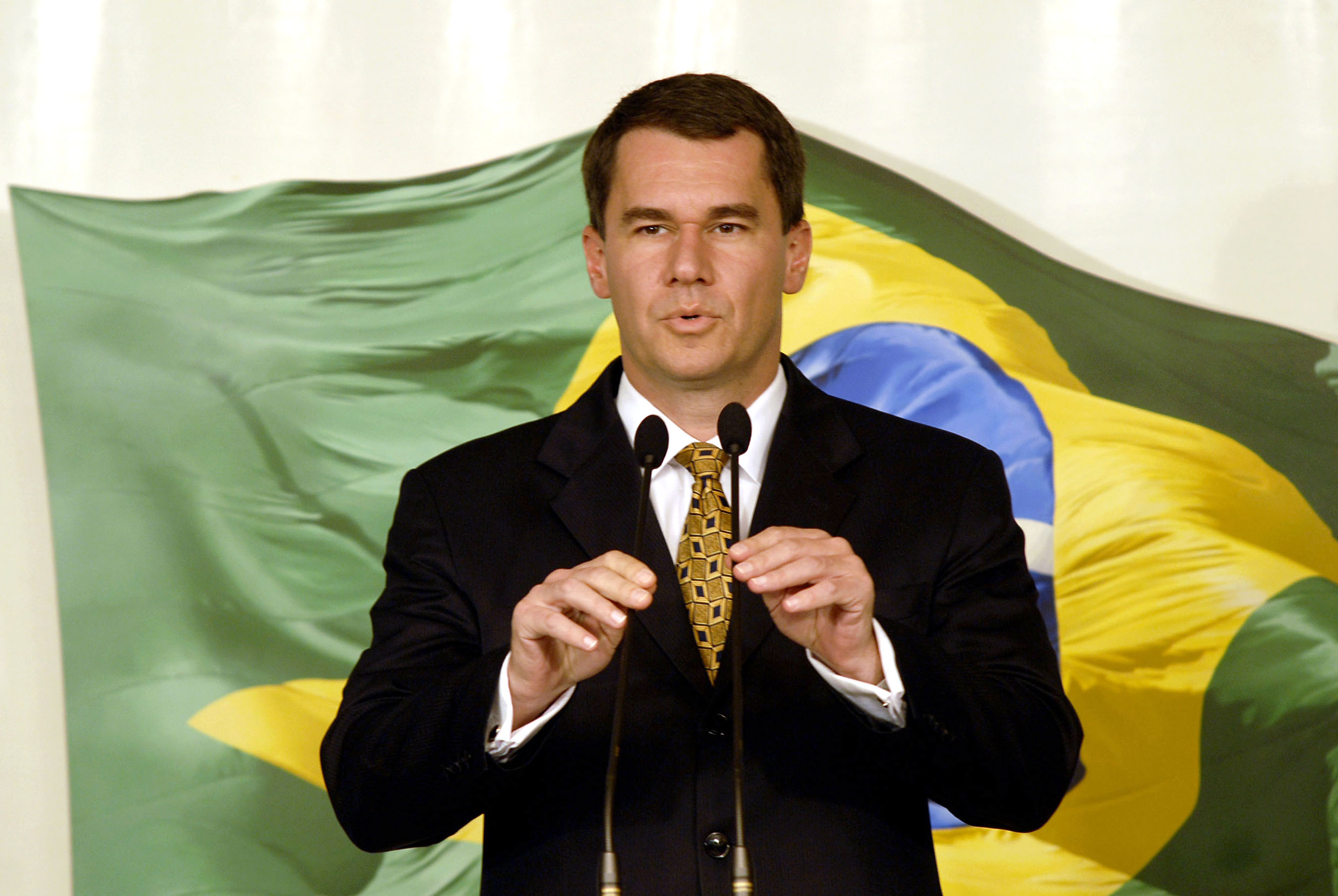 Porta-voz da Presidência da República do Brasil, Marcelo Baumbach.